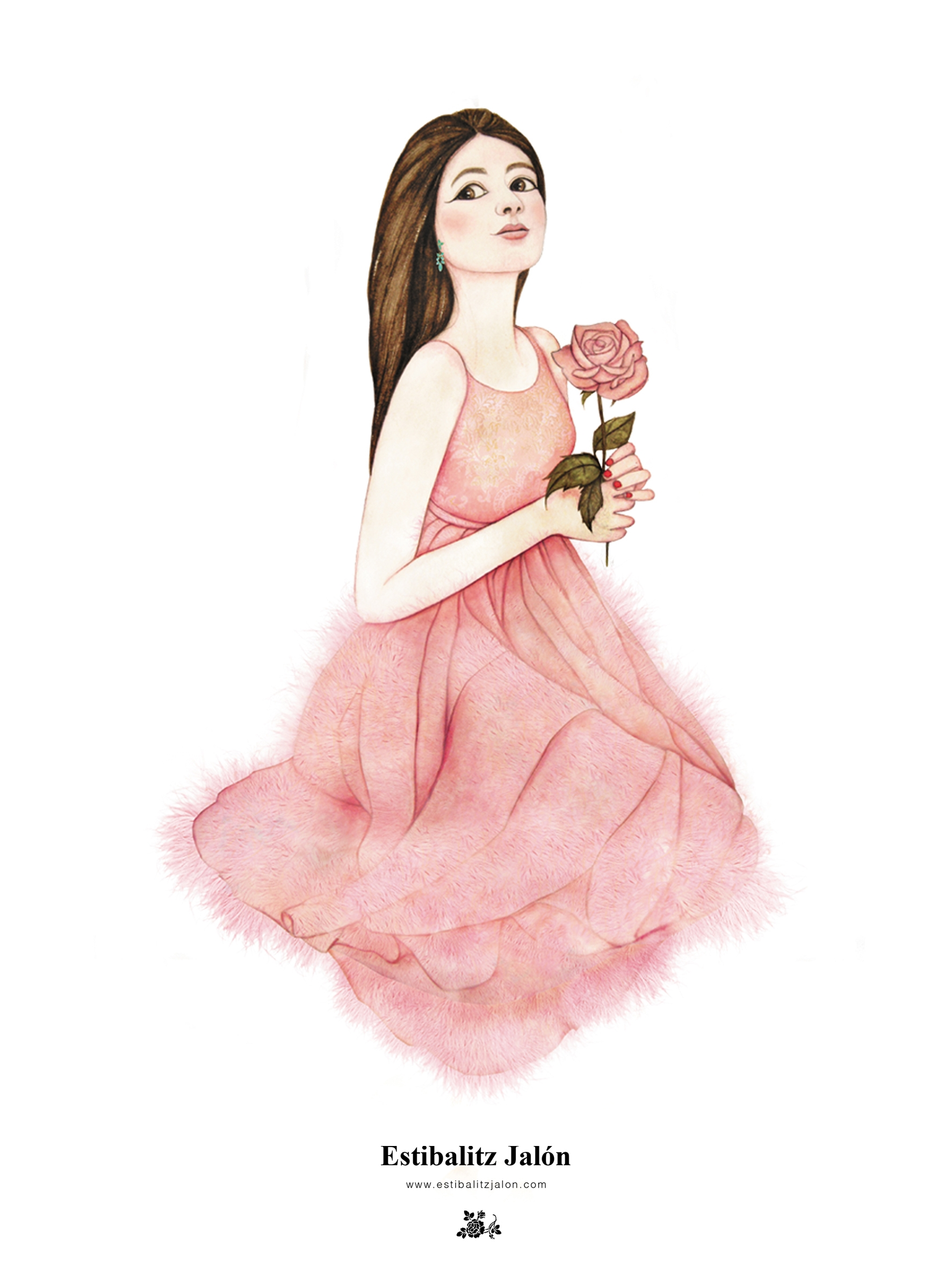 Estibalitz Jalon